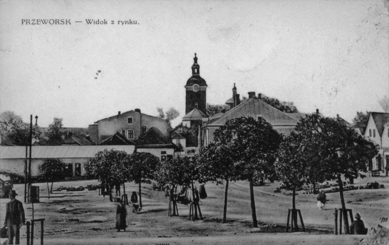 Rynek w Przeworsku, widok na Bazylikę - 1915